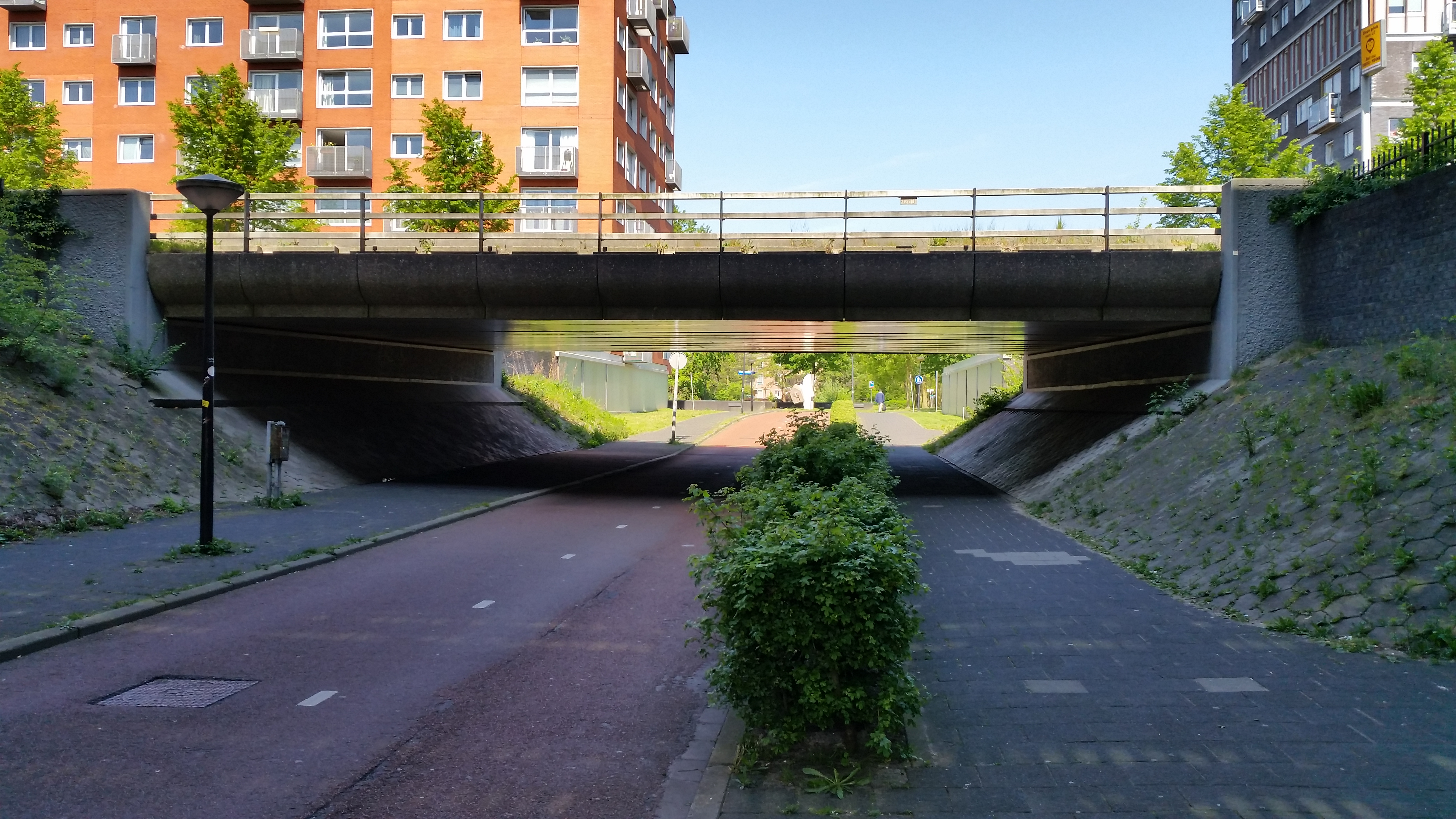 Impressie van brug 1260; Burgemeester Stramanbrug, Amsterdam-Zuidoost